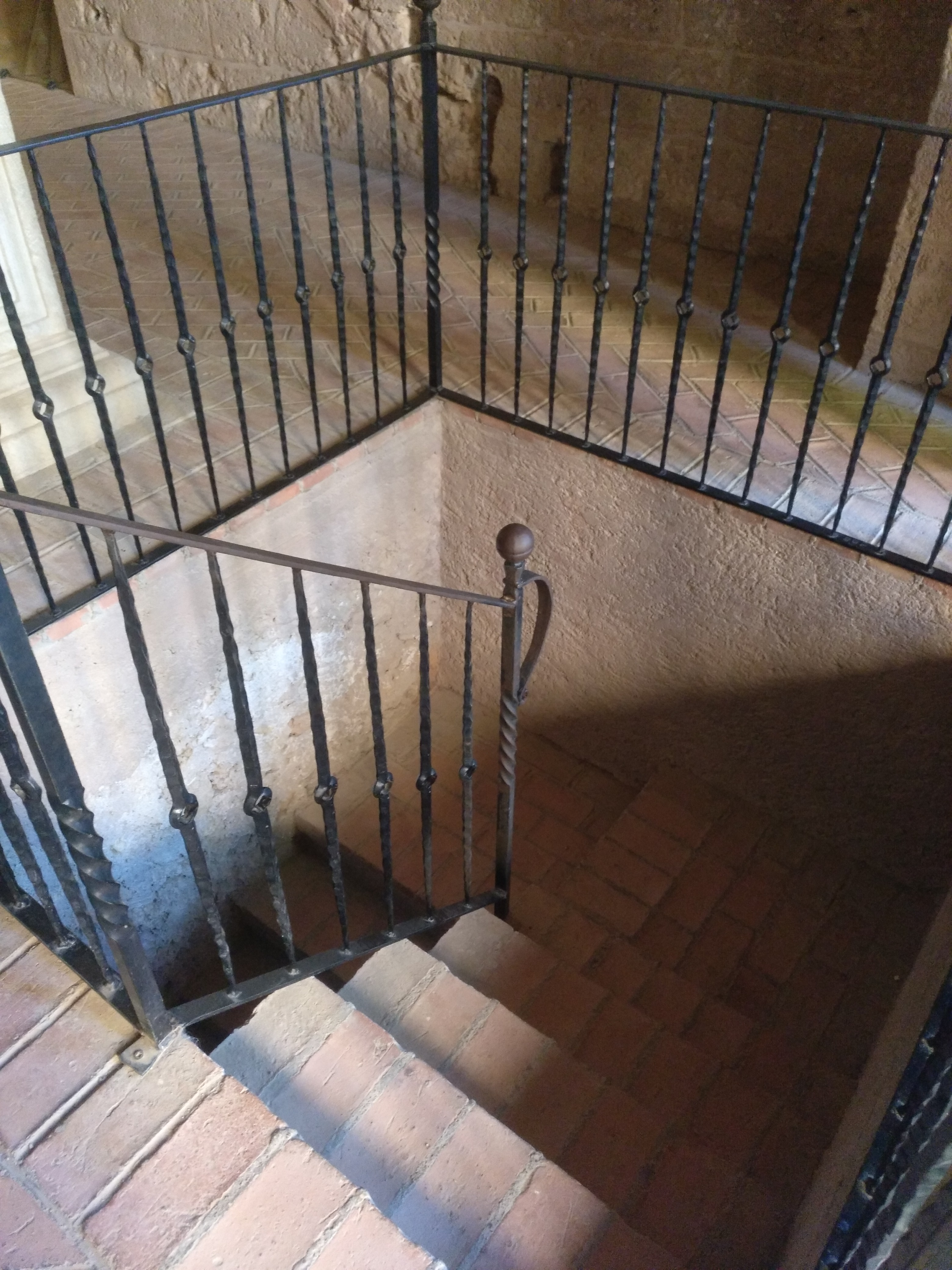 Entrada a la gloria (antiguo sistema de calefacción) del Monasterio de Piedra en Calatayud, Aragón